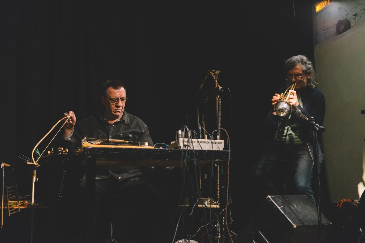 на сцене Музея Звука